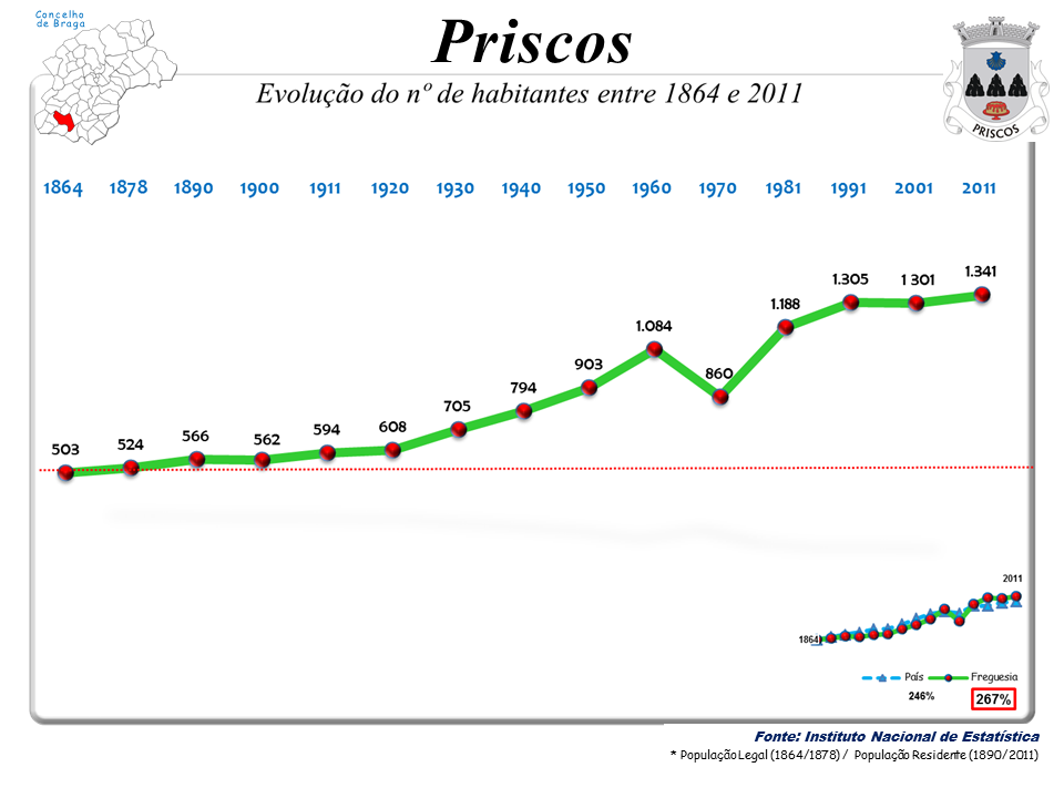 Censos 1864/2011